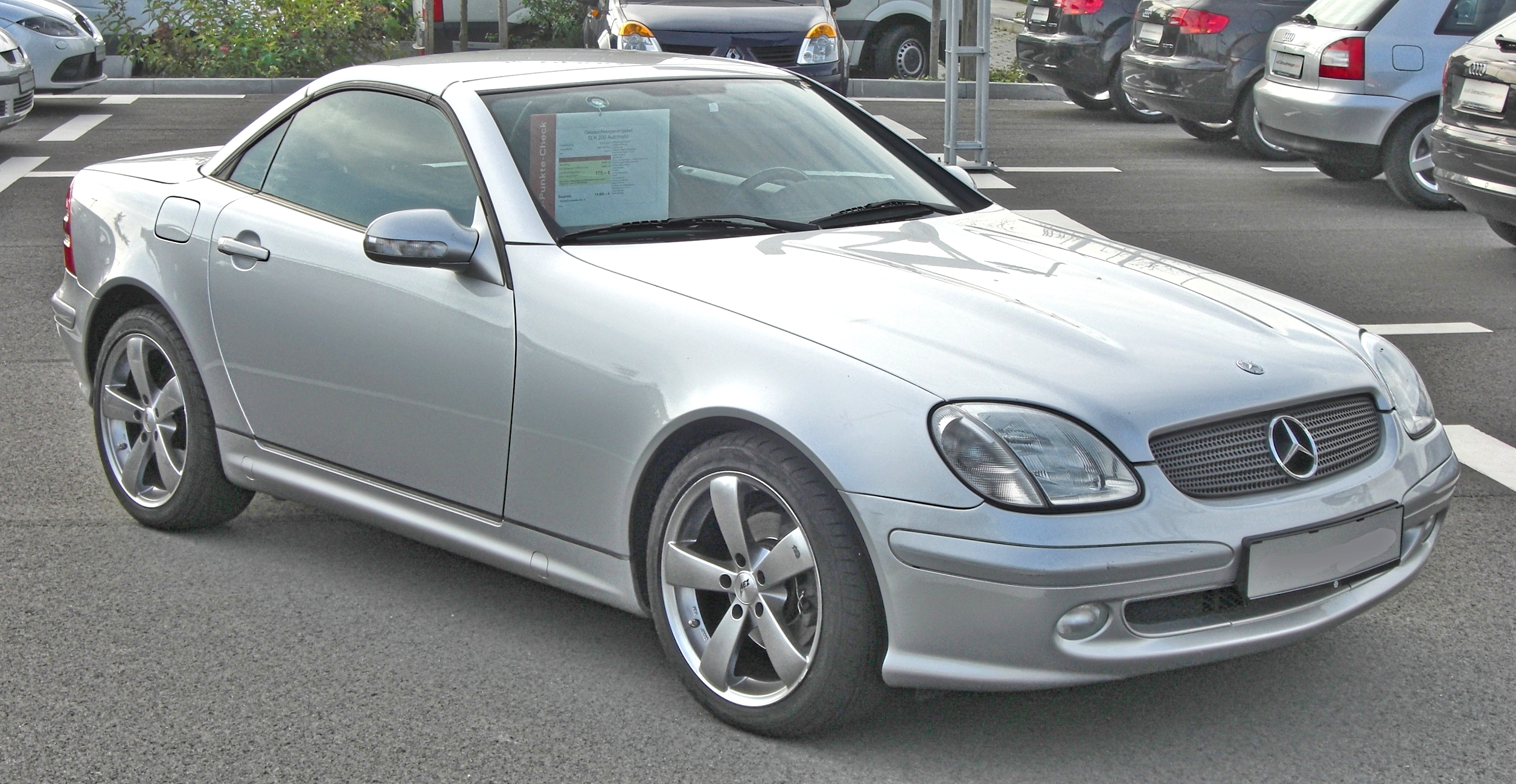 Mercedes SLK